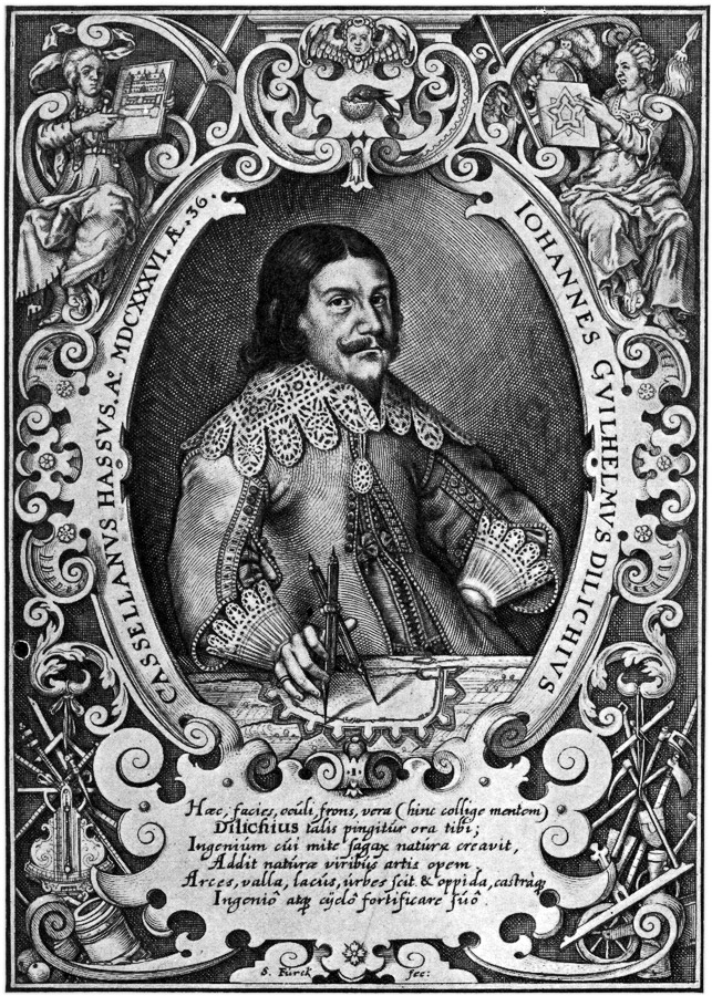 Johann Wilhelm Dilich, der 1628 bis zu seinem Tod 1660 für die bastionäre Befestigung der Stadt Frankfurt am Main tätige Festungsbaumeister.